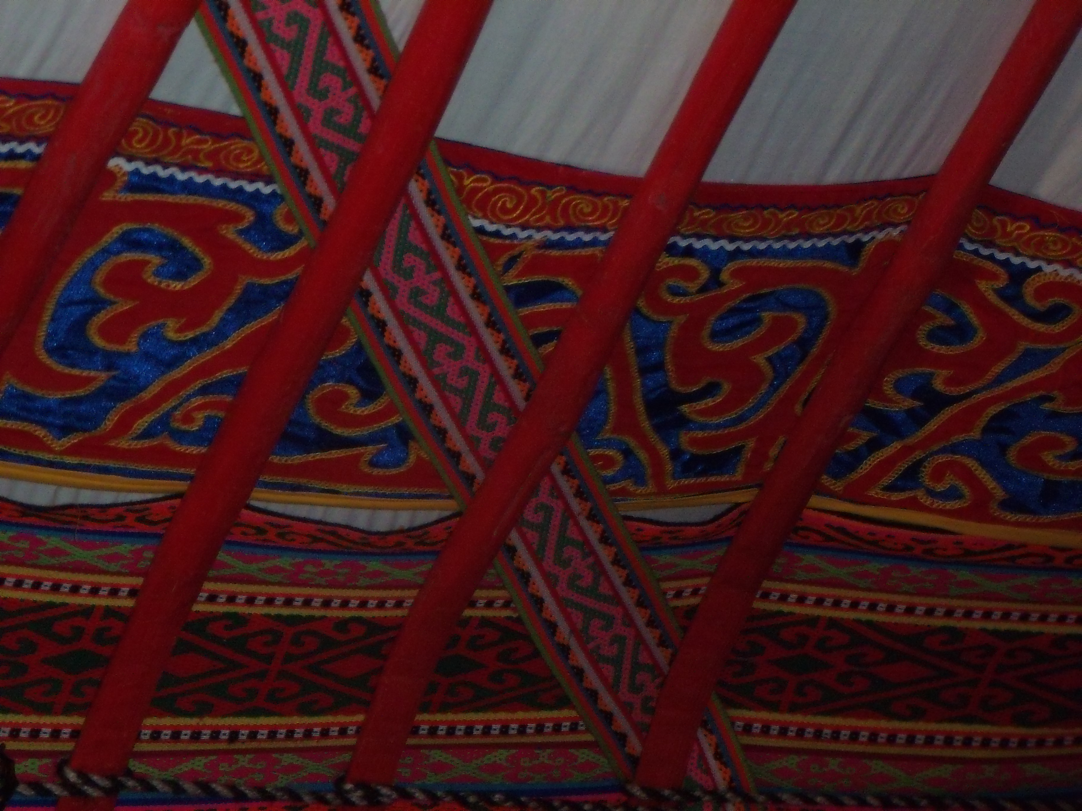 Баскур - узорчатая тесьмя для скрепления конструкций юрты и её оформления (горизонтальные ленты)